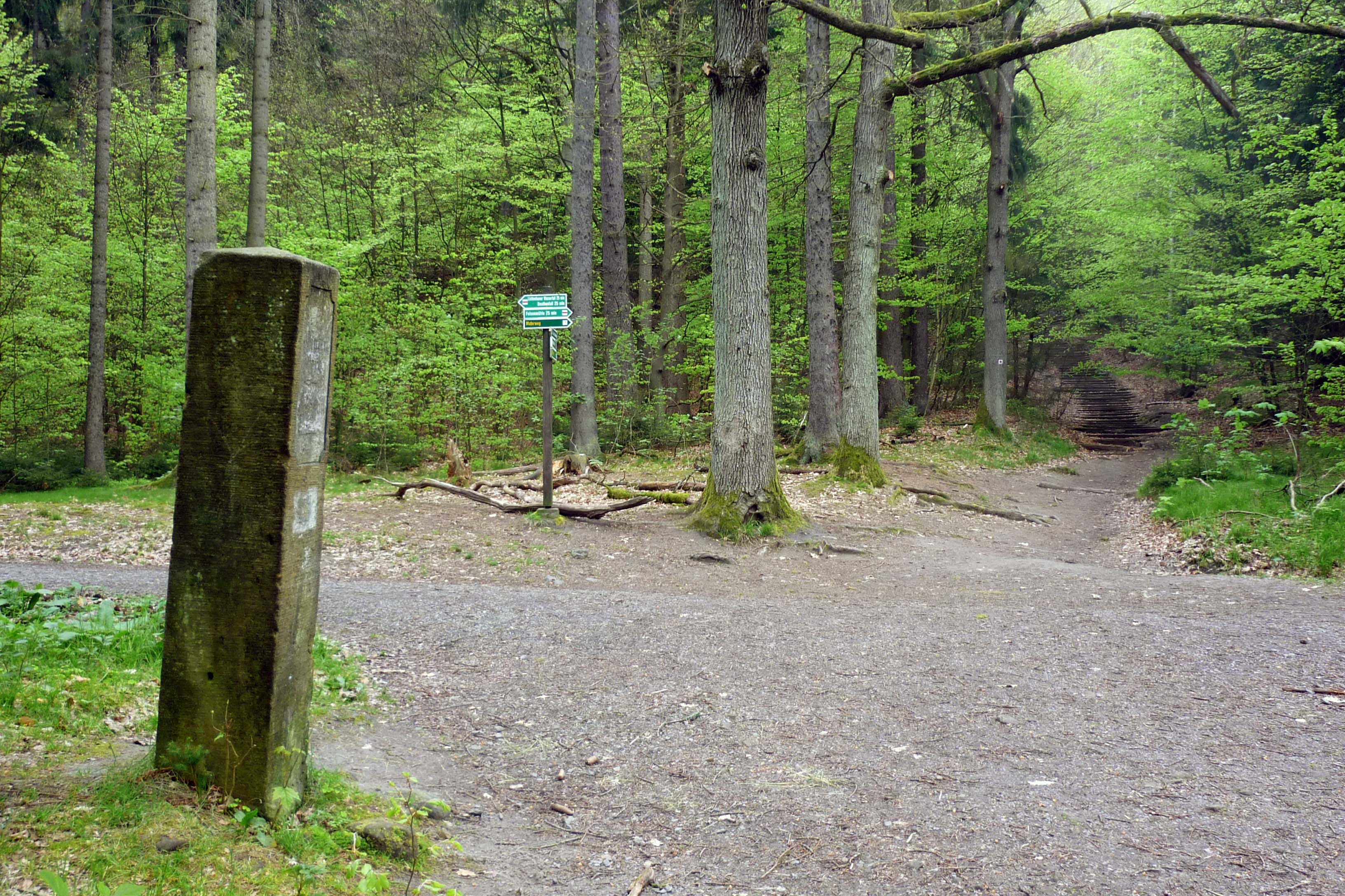 Fremdenweg Lichtenhainer Wasserfall – Prebischtor: Wegestein an der Kreuzung mit dem Haussteig